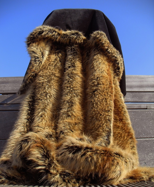 Fourrure synthétique raton polyester